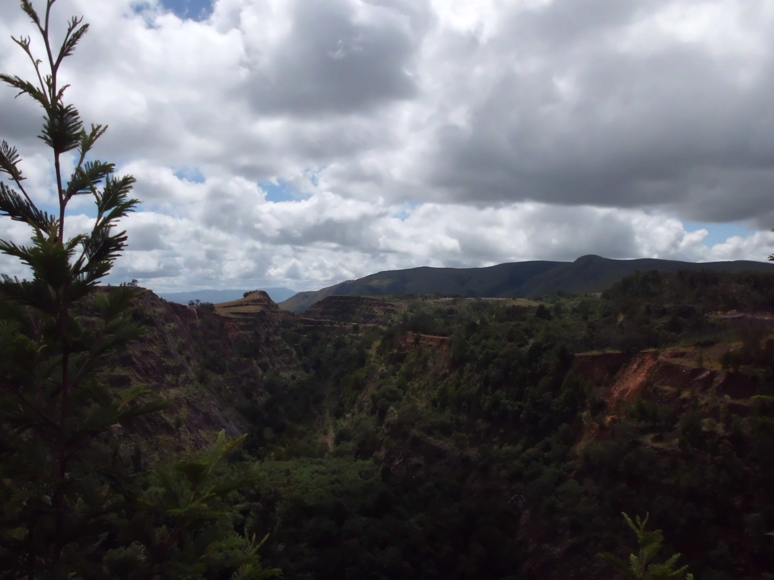 Ngwenya Mine